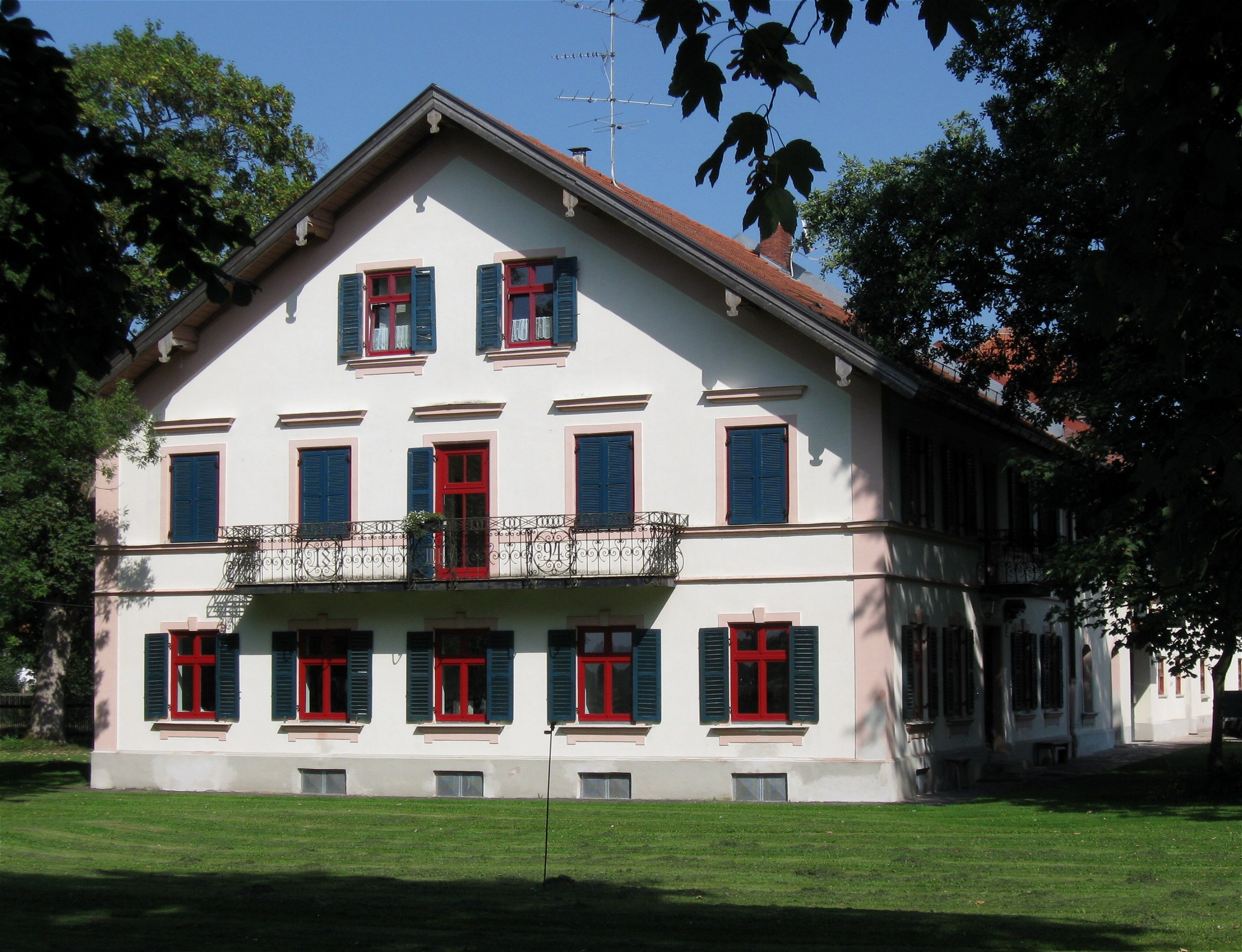 Zwergerstraße 2; Beim Moar, ehemaliger Gutshof, Einfirstanlage, Wohnteil mit Putzgliederungen und Eisenbalkon im Westen, angeschlossen langer Stalltrakt, 1892. D-1-84-146-5